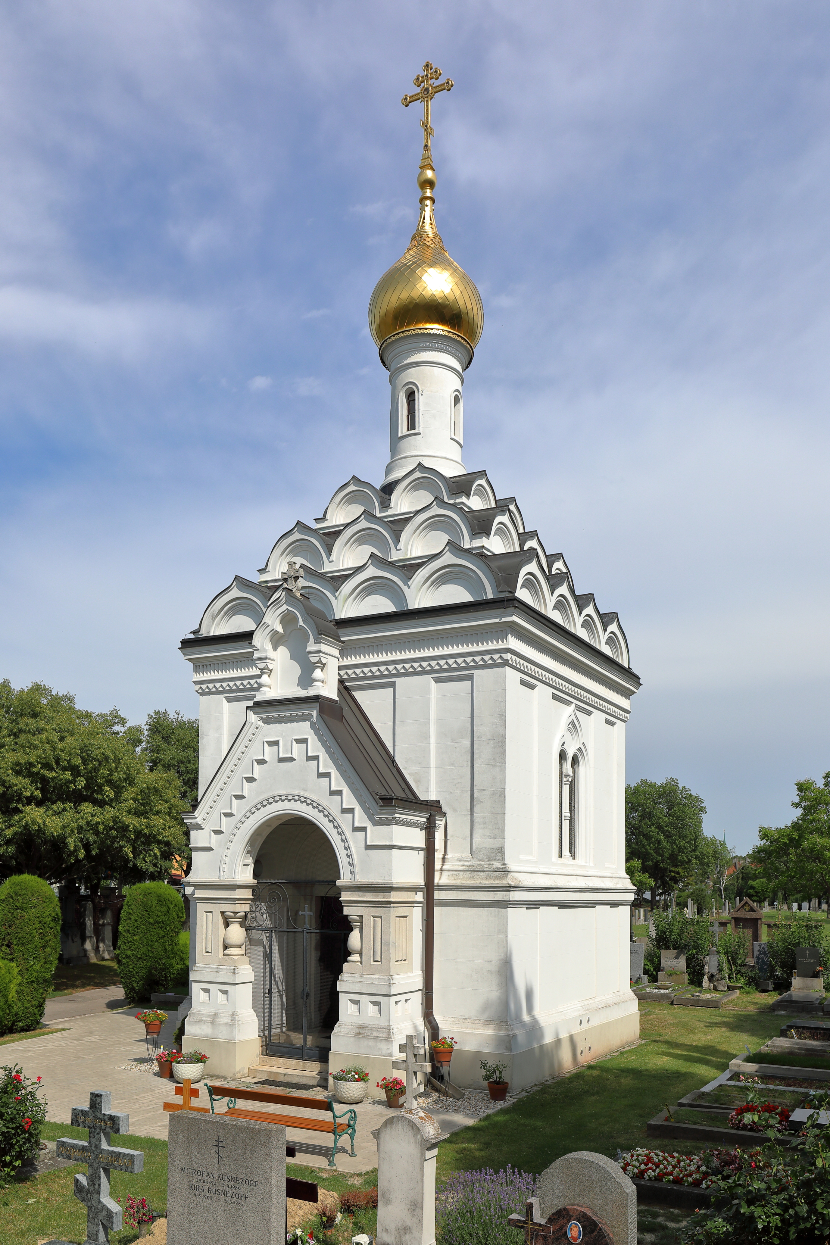 Westansicht der russisch-orthodoxen Kirche zum hl. Lazarus auf dem Wiener Zentralfriedhof im 11. Wiener Gemeindebezirk Simmering. Die Friedhofskirche wurde am 26. April 1895 (julianischer Kalender) geweiht. Anfang der 2000er Jahre wurde sie geschlossen, ab 2004 renoviert und am 12. Oktober 2006 vom Metropolit Kyrill von Smolensk und Kaliningrad neu geweiht.